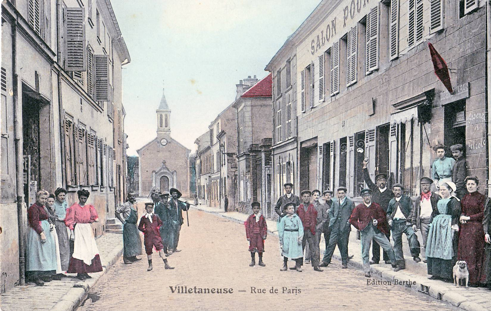 Carte postale ancienne éditée par Berthe VILLETANEUSE - Rue de Paris (vers l'église, avant 1908)